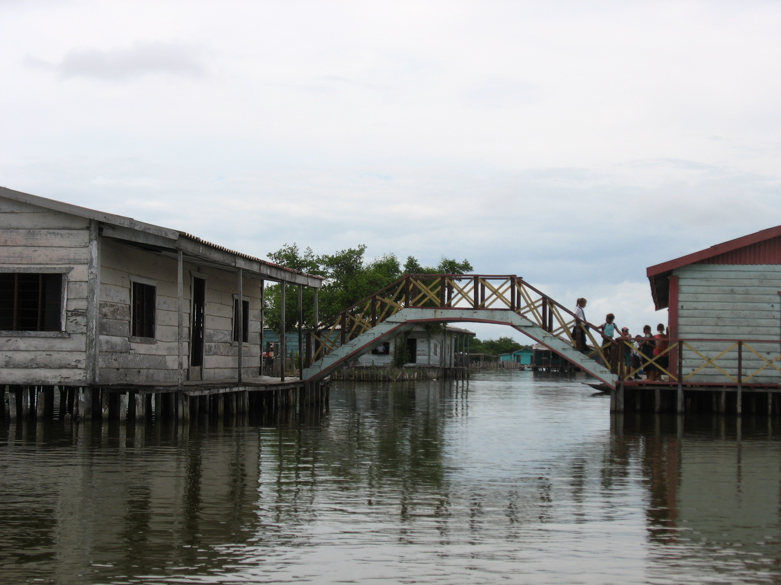 Puente en madera en la zona de palafitos en el corregimiento de Nueva Venecia que pertenece al municipio de Sitio Nuevo en el Departamento del Magdalena en Colombia.